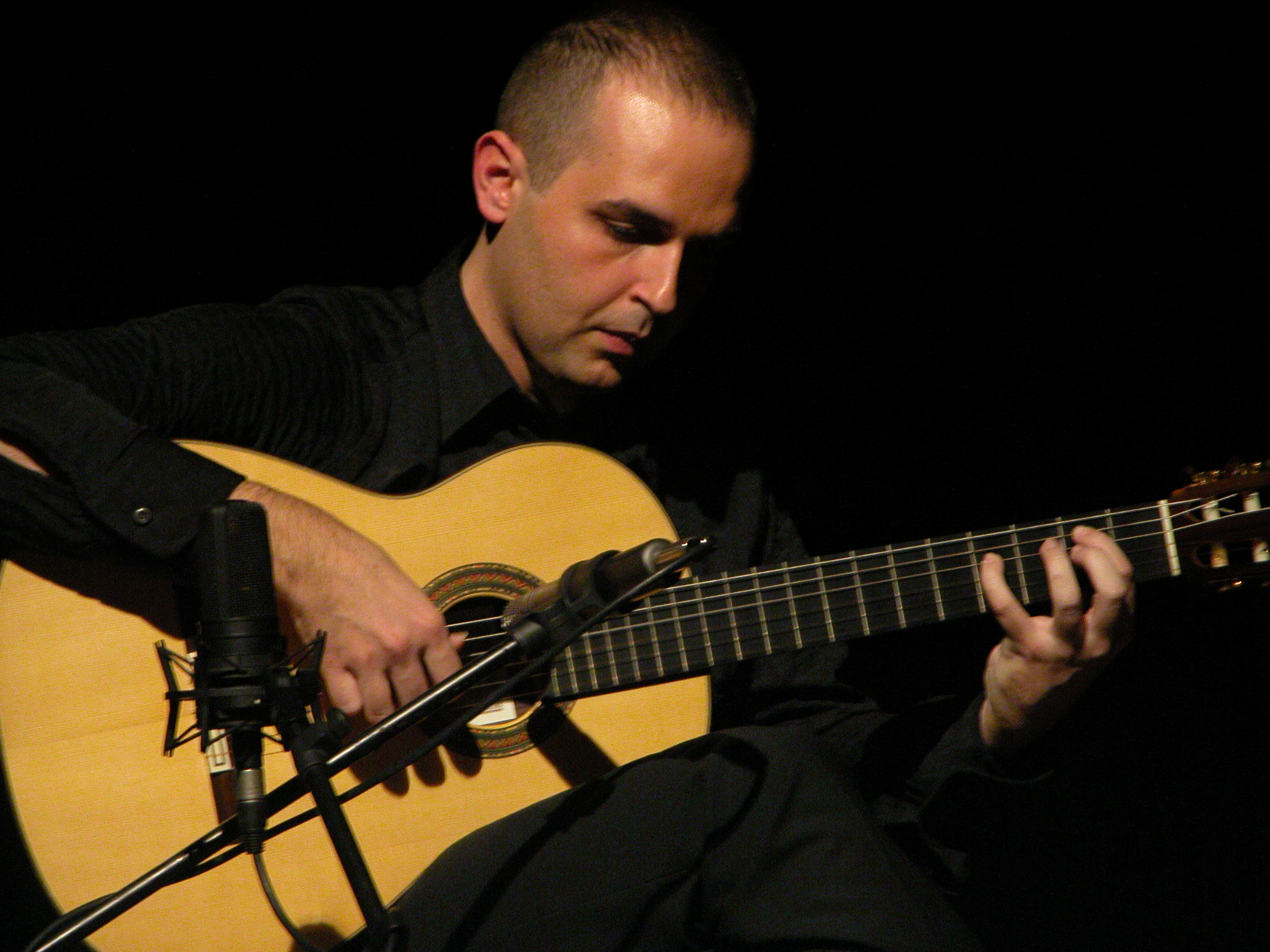 Foto de David Leiva